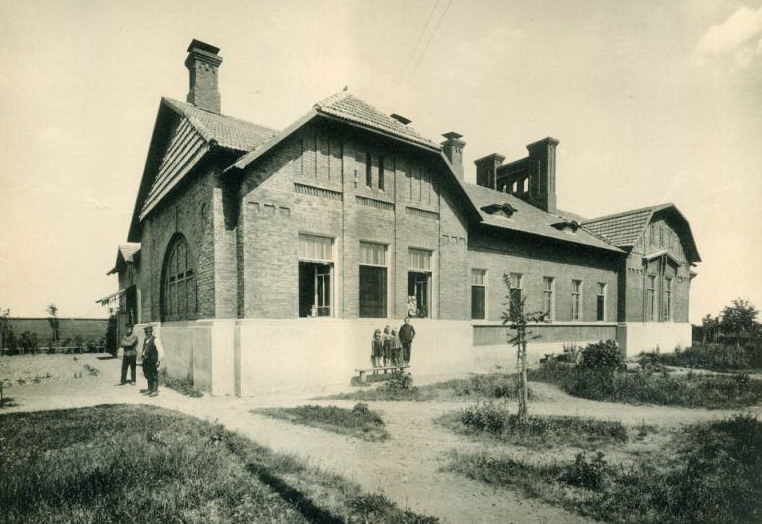 Станция биологической очистки сточных вод на Остаповском шоссе (ныне дом № 36 по Волгоградскому проспекту). Построена в 1899-1901 годах.